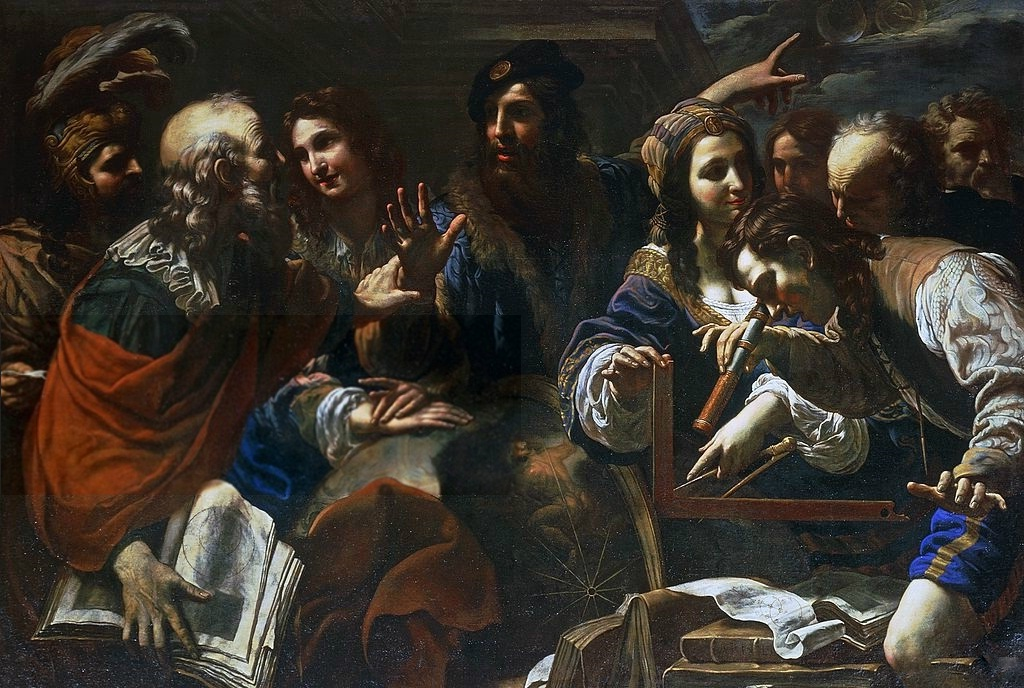 Los Astrónomoslabel QS:Les,"Los Astrónomos"